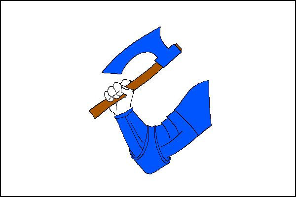 Vlajka obce Ostroměř